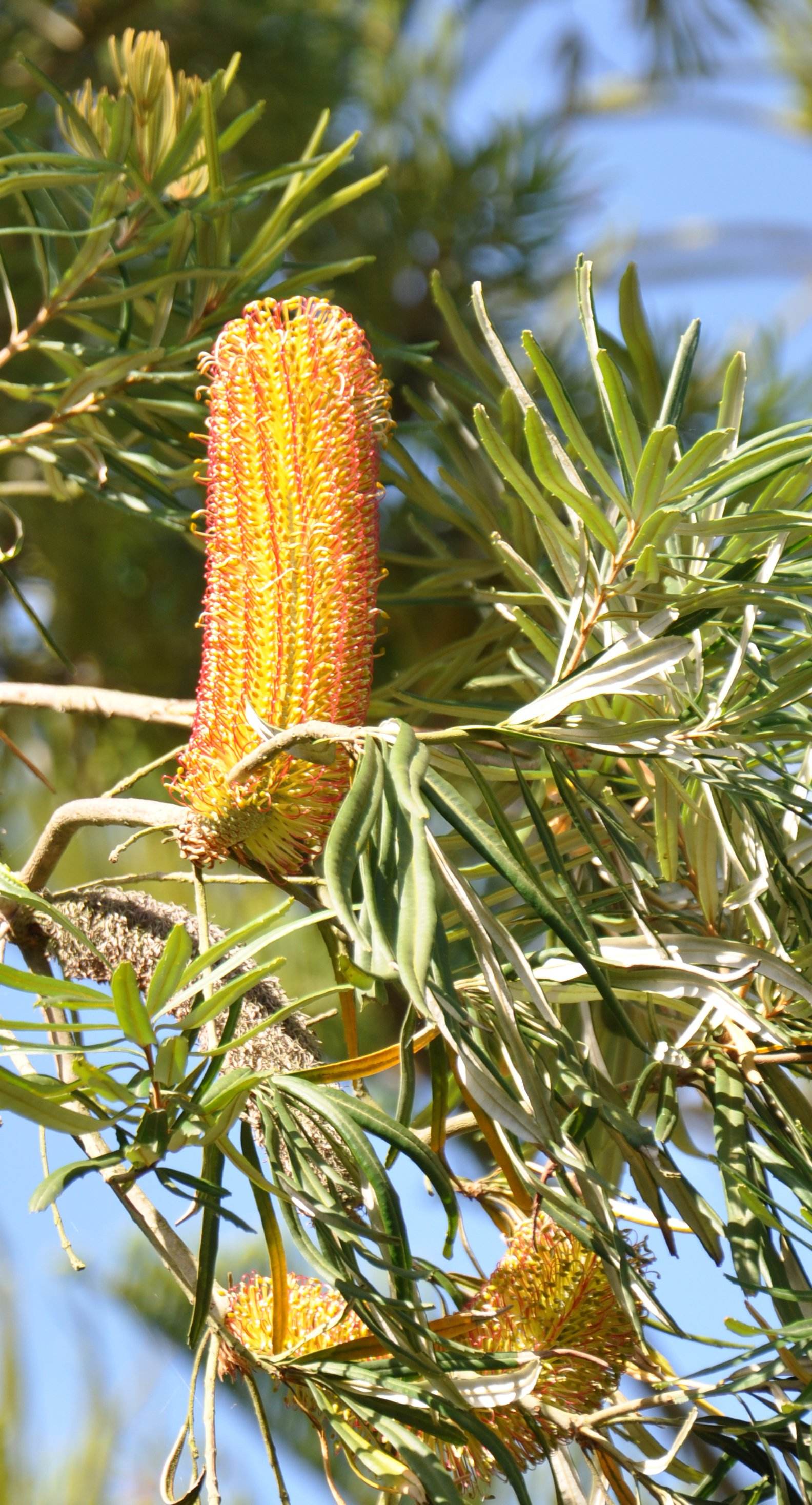 Banksia seminuda en fleur le 30/09/2012 au Jardin exotique & botanique à Roscoff